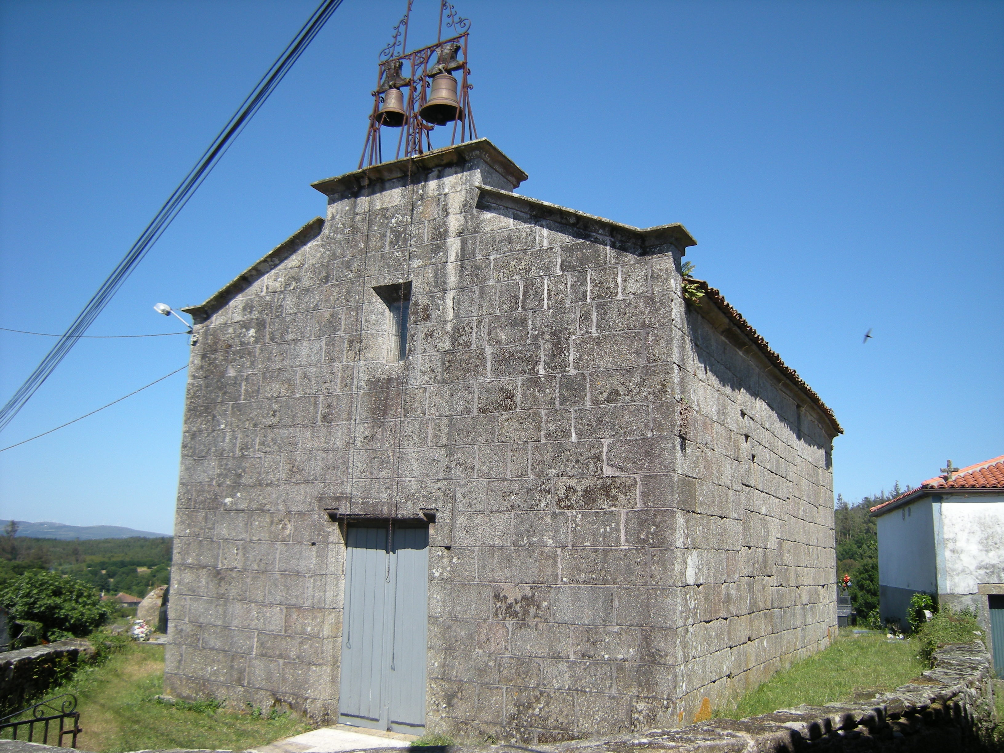 Iglesia de Santa María de Berredo